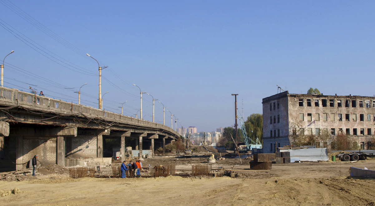 "Газовий" міст на вул. Радянській (Луганськ)